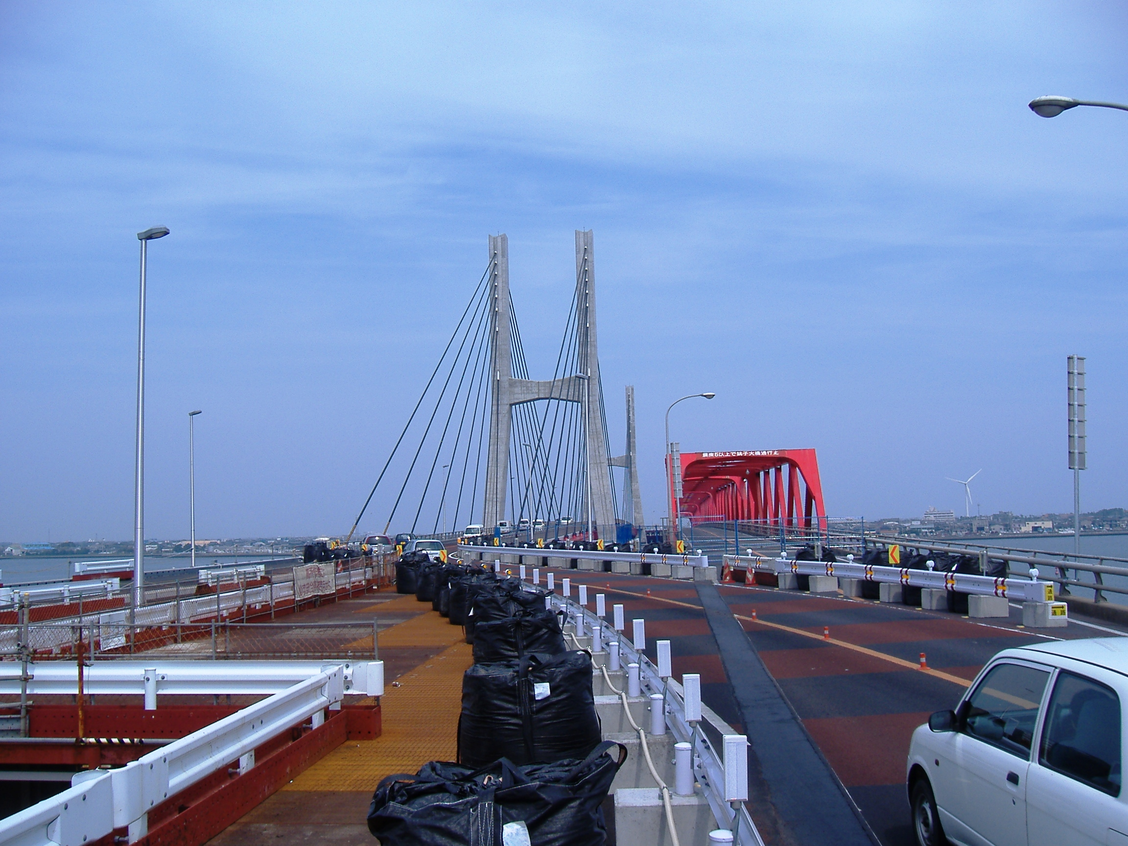 銚子大橋暫定開通部分